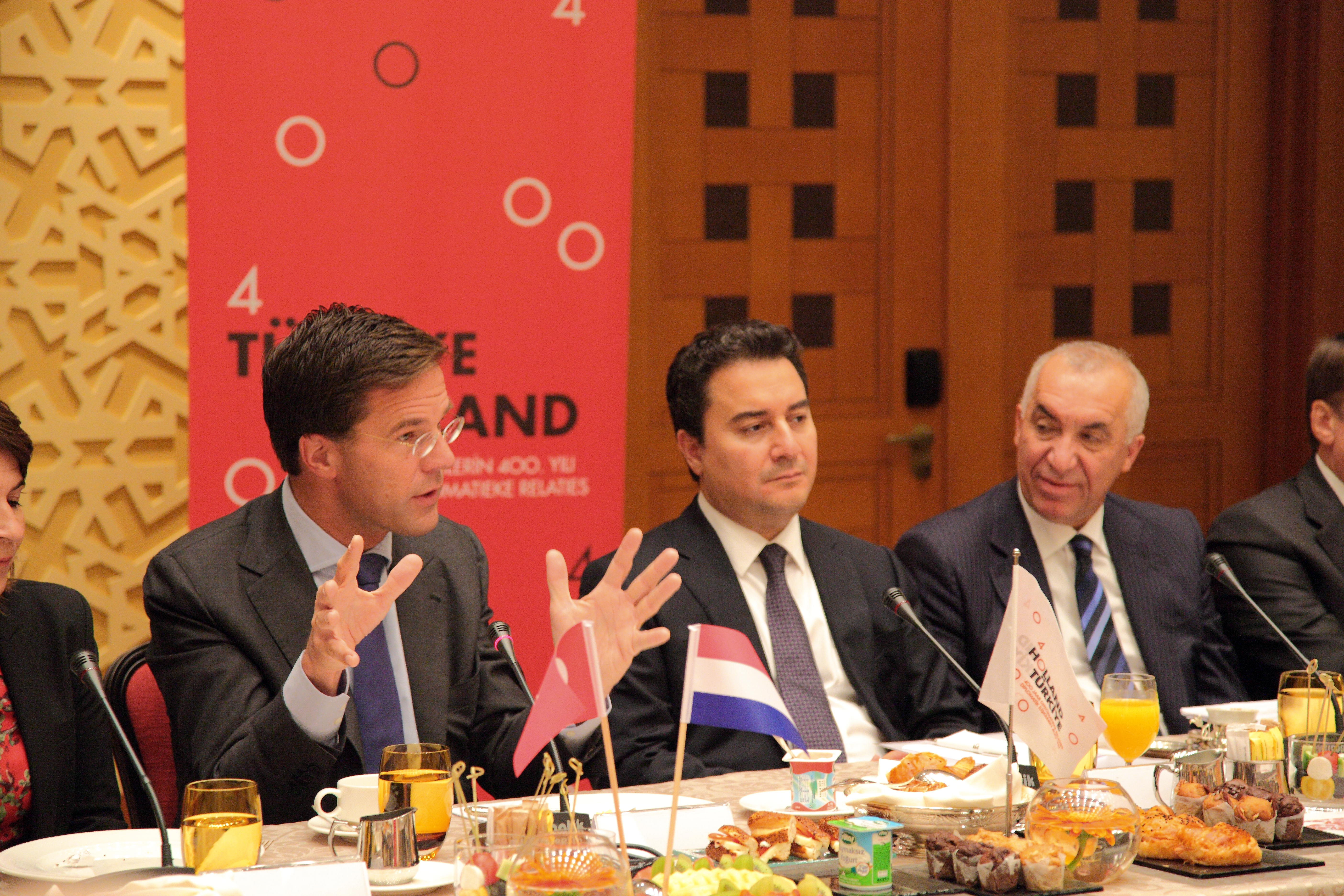 Minister-president Rutte en de Turkse minister van Economie, en tevens vicepremier Babacan tijdens het ronde tafelgesprek.